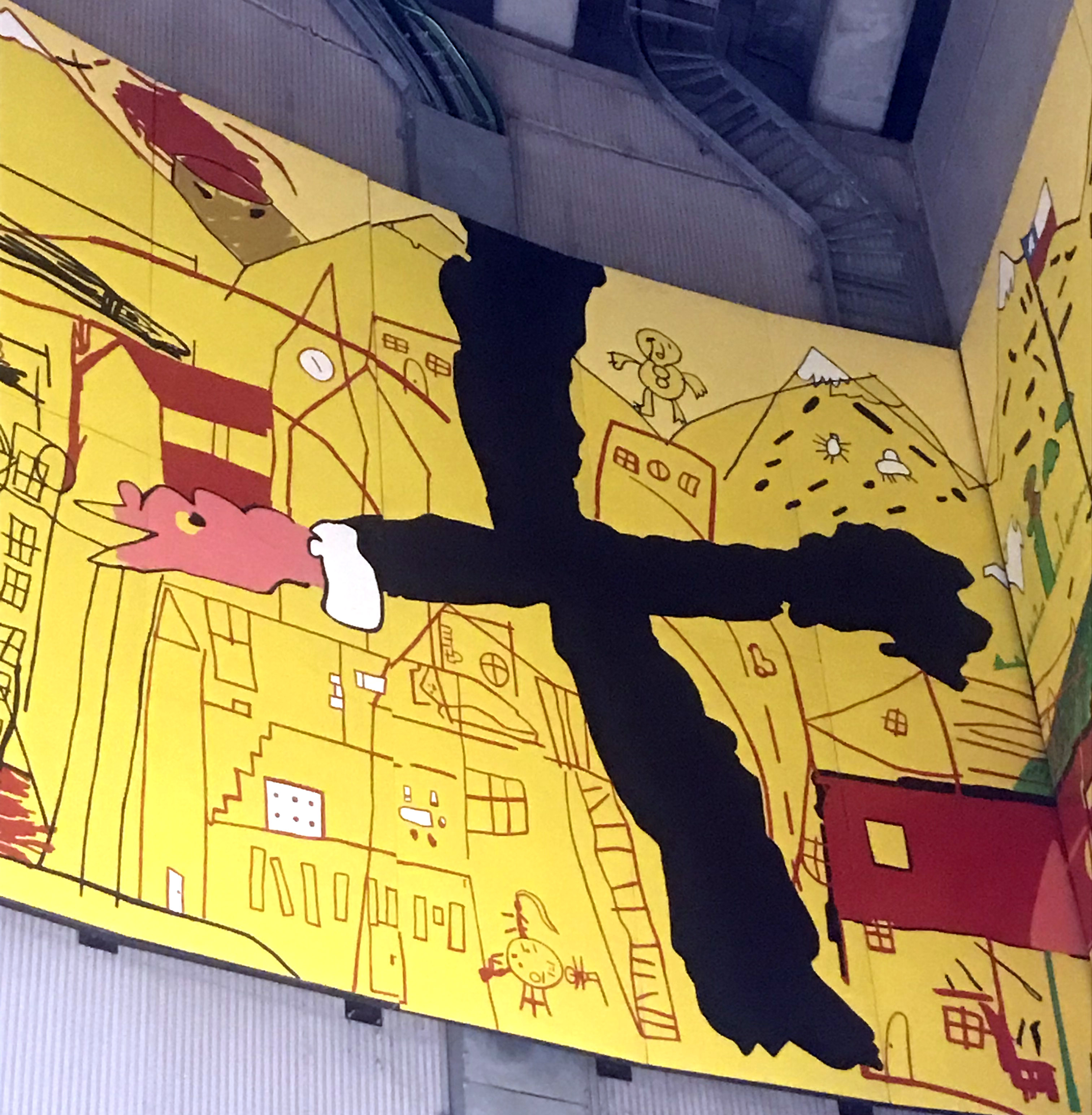 Fragmento Mural Metro Fernando Castillo Velasco, La Reina, Santiago de Chile.